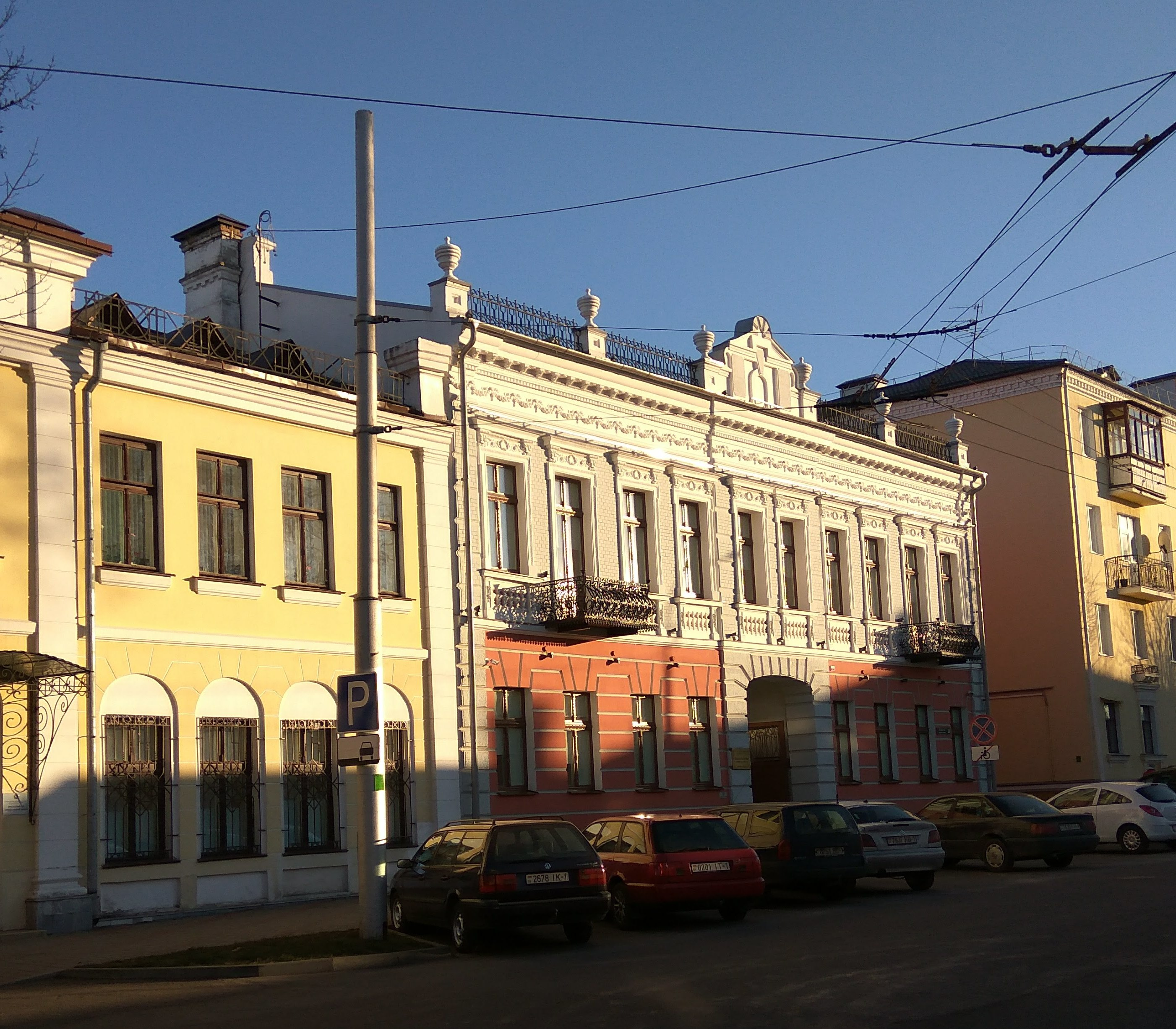 Брэст. Вуліца Савецкіх пагранічнікаў